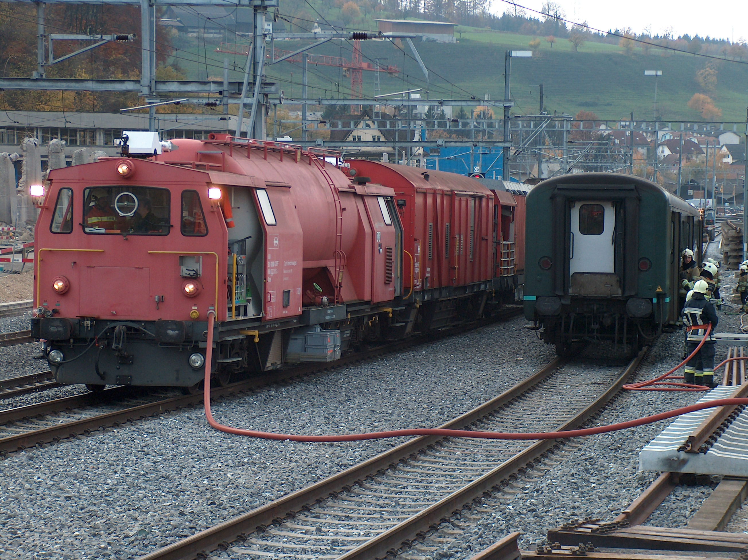 Einsatz des Lösch- und Rettungszug Basel an der Hauptübung "Senza Limiti" der Stützpunktfeuerwehren Liestal und Sissach, der Feuerwehr Lausen, der Betriebswehr der SBB, der Chemiewehr und des Katastrophenschutzes, in Lausen, Höhe alter Bahnhof/Güterterminal